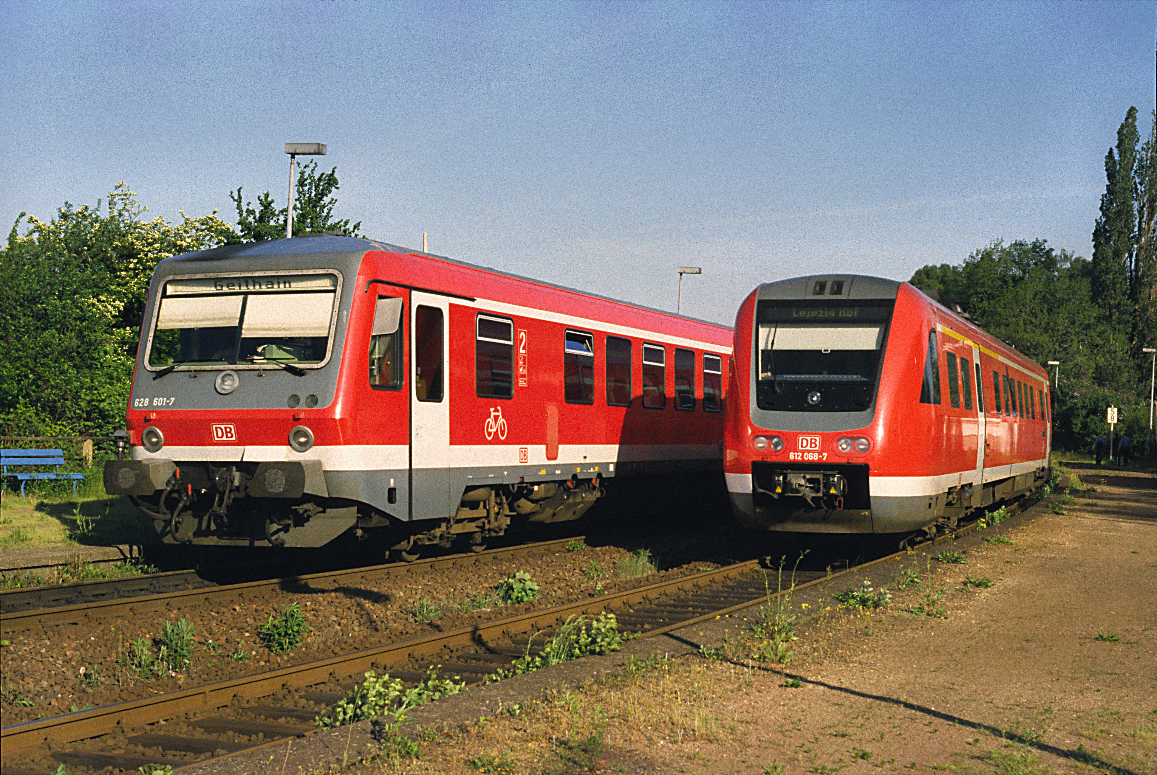 Engelsdorf Werkstätten, Strecke Leipzig–Chemnitz. Vor dem Streckenausbau der übliche Fahrzeugeinsatz, die 612 verkehrten von Anfang an als Regionalexpress